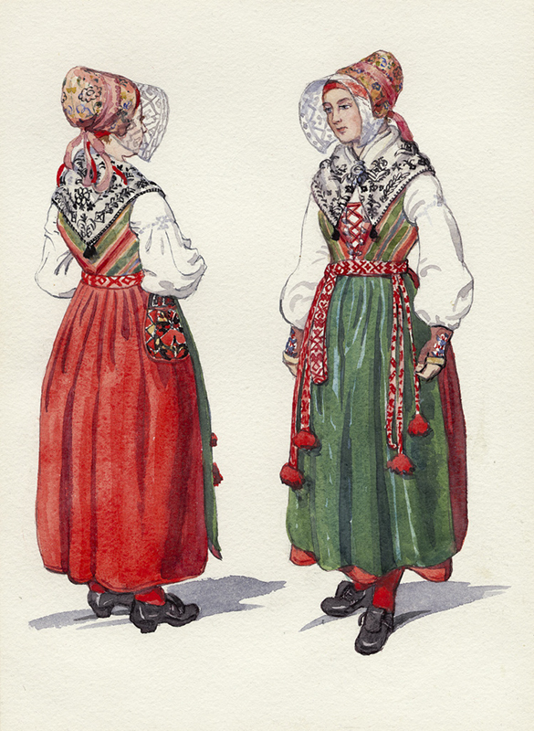 Folkdräkt, kvinnodräkt från Åls socken i Dalarna, sedd både framifrån och bakifrån. Akvarell av Emelie von Walterstorff.